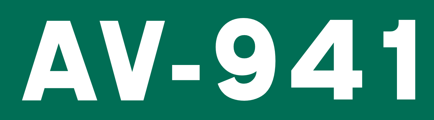 Cajetín de la carretera autonómica AV-941.